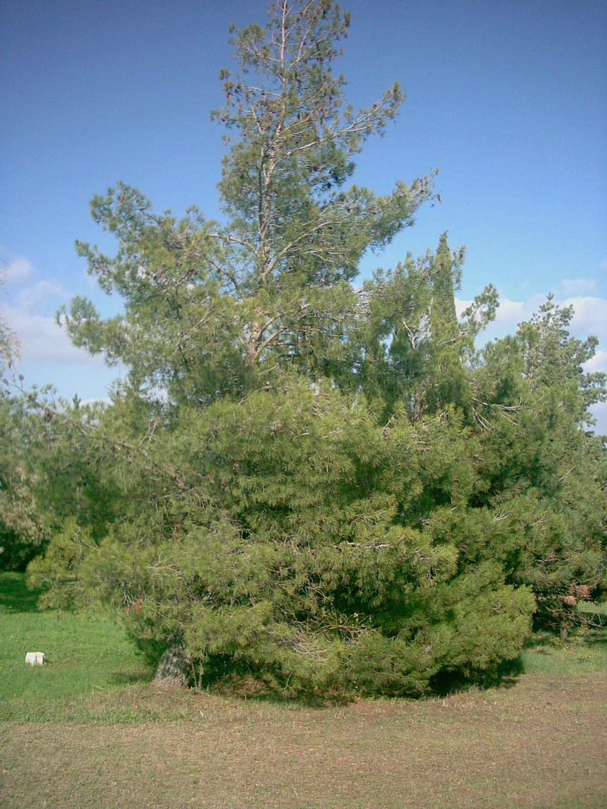 Immagine orto botanico